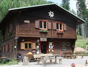 Bertahütte am Fuße des Mittagskogels, Kärnten, Österreich